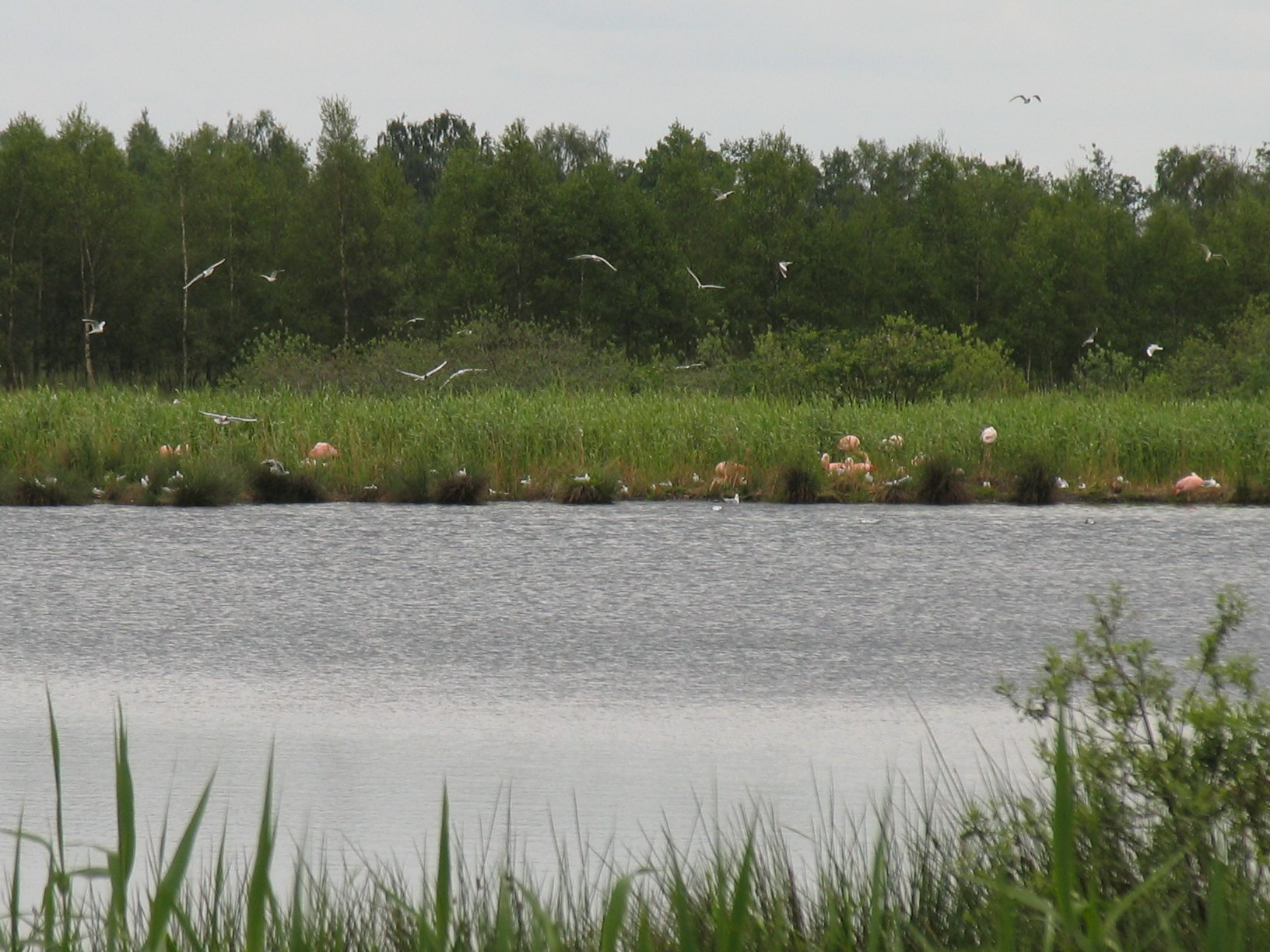 Flamingos at Zwillbrocker Venn